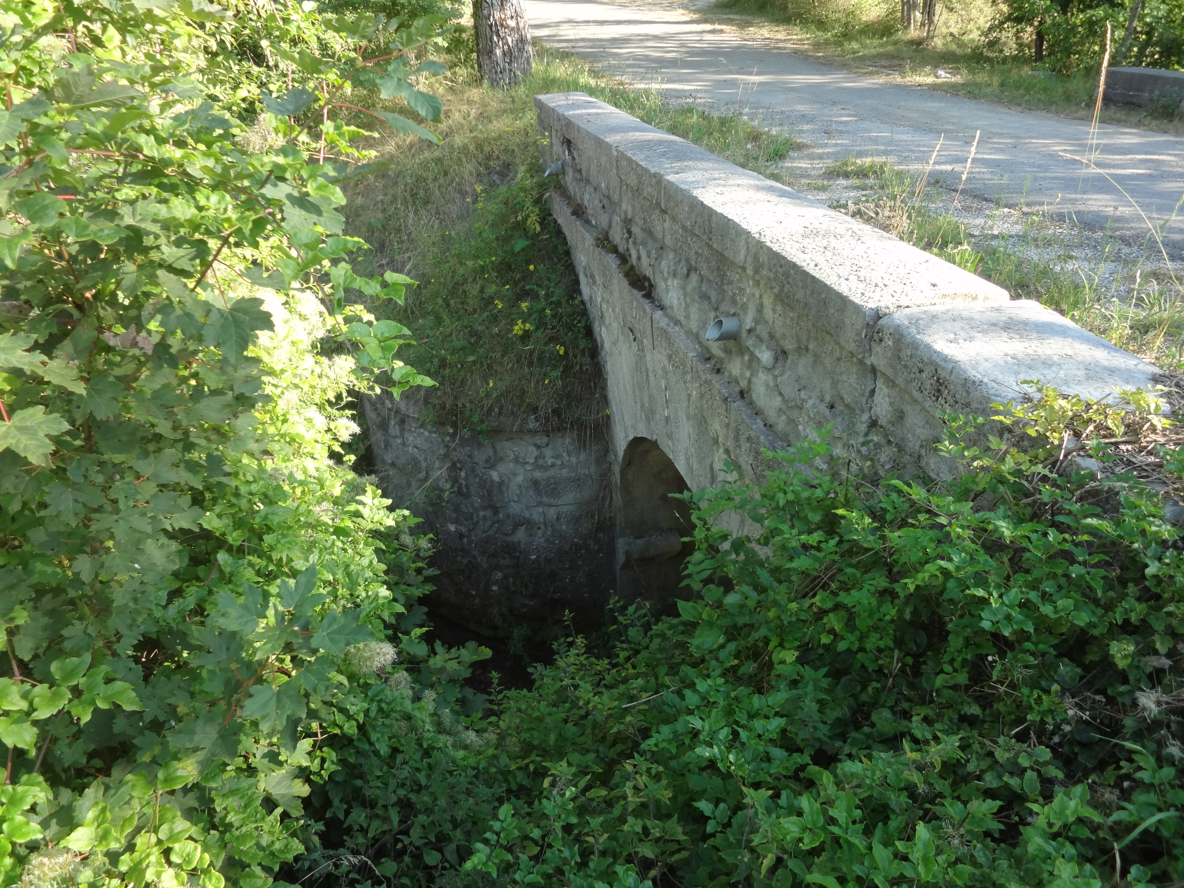 Pont de l'ancienne route nationale 85 ou route Napoléon, situé sur un délaisse à l'est de La Garde. Un massif semblable se trouve à chaque angle du pont, aval et amont, rive droite et rive gauche.